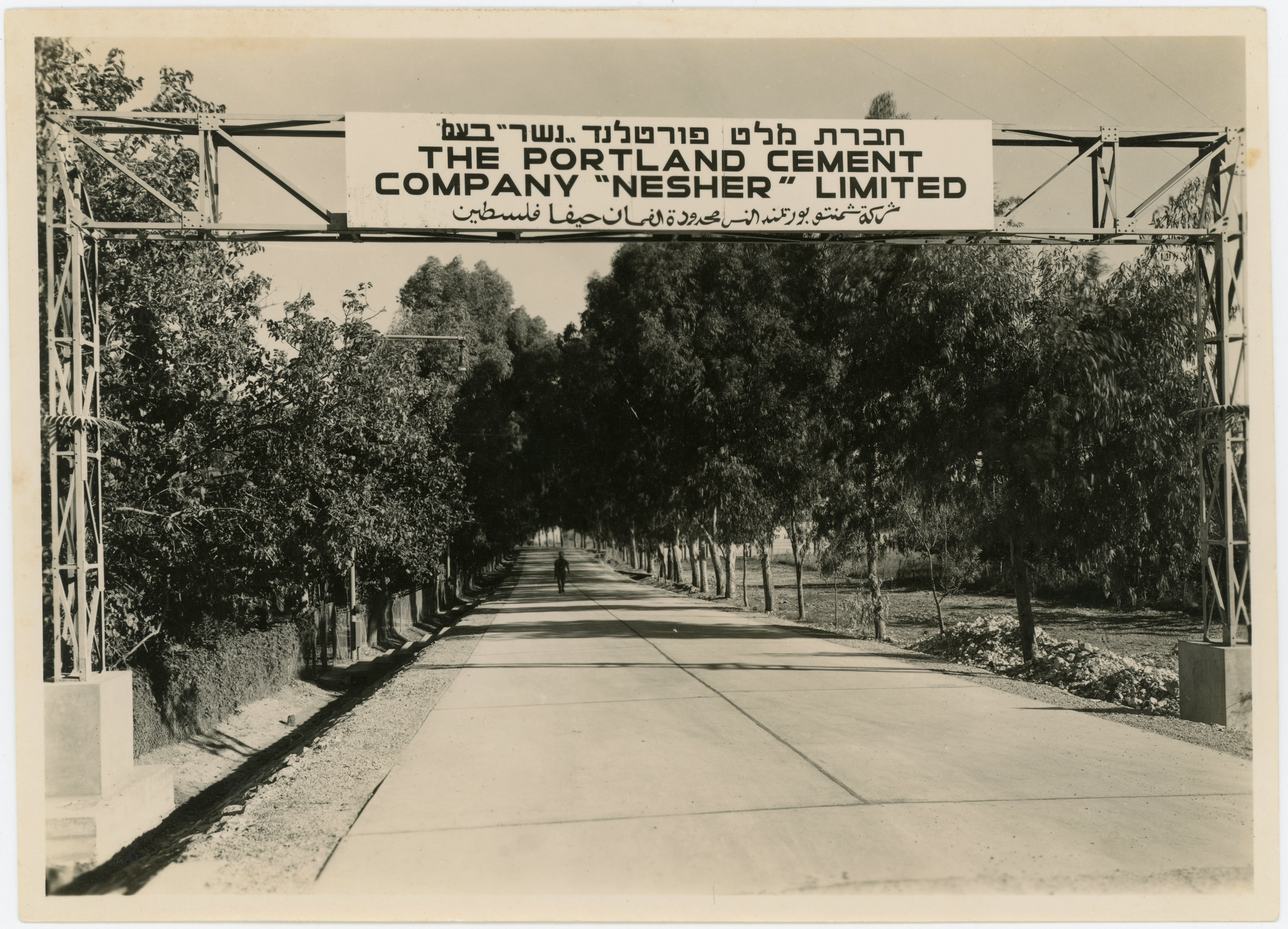 הכניסה לבית החרושת נשר למלט שבאותה עת נקראה חברת מלט פורטלנד "נשר" בע"מ The Portland Cement Company “Nesher” Limited